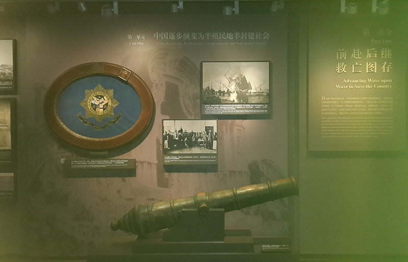 la première partie de l'exposition: on se précipitent pour sauver l’État